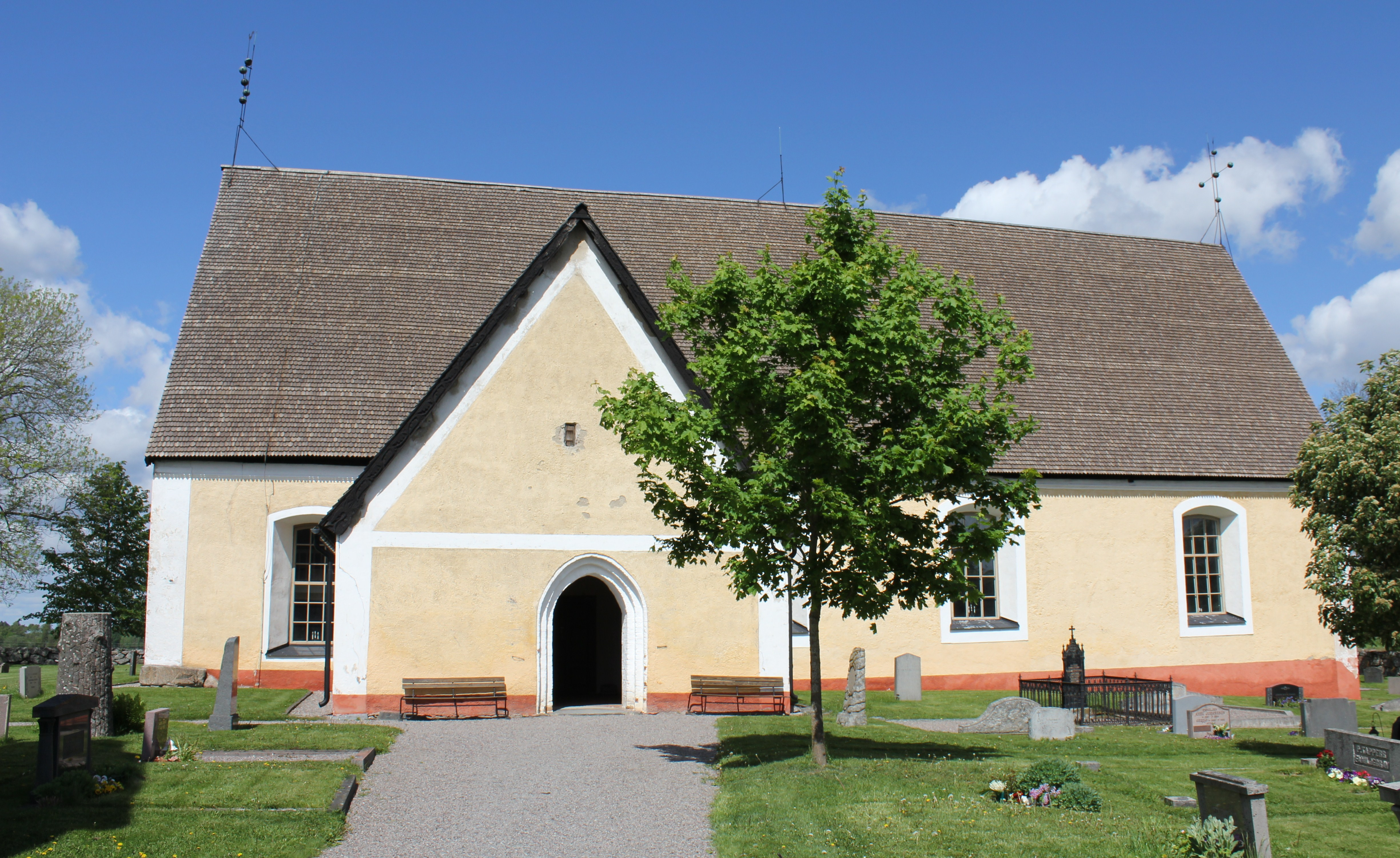 Boglösa kyrka, Enköpings kommun. Foto av uppladdaren.